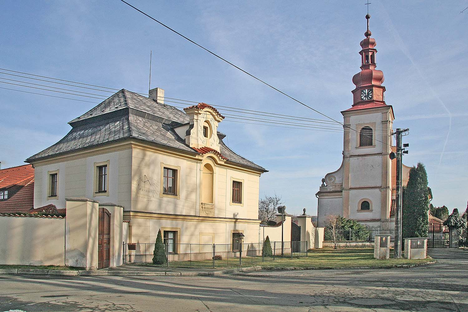 Veletov - kostel svaté Markéty, district Kutná Hora autor: Prazak date: 5. 2. 2007